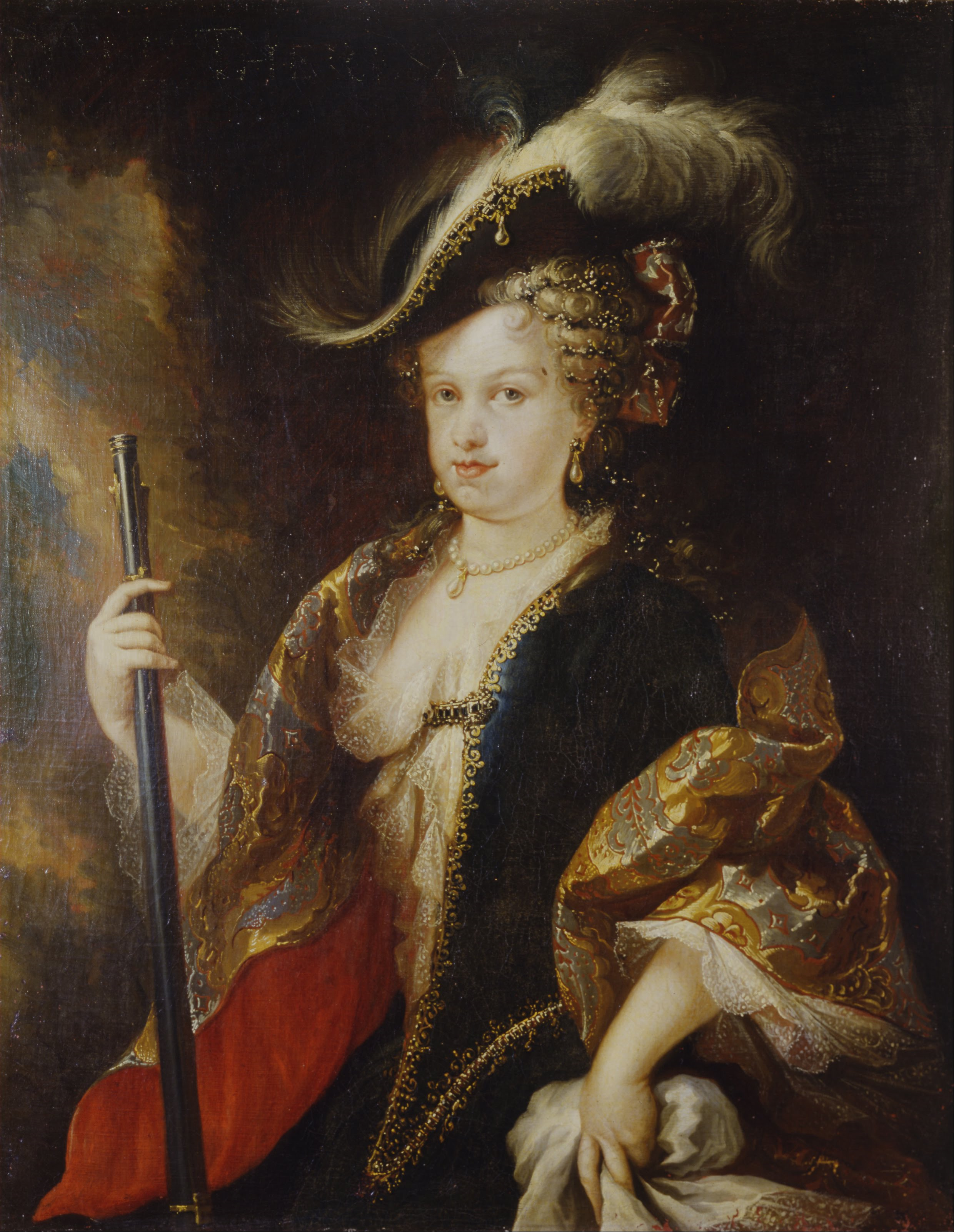 Retrato de la reina María Luisa Gabriela de Saboya (1688-1714), que fue la primera esposa del rey Felipe V de España.